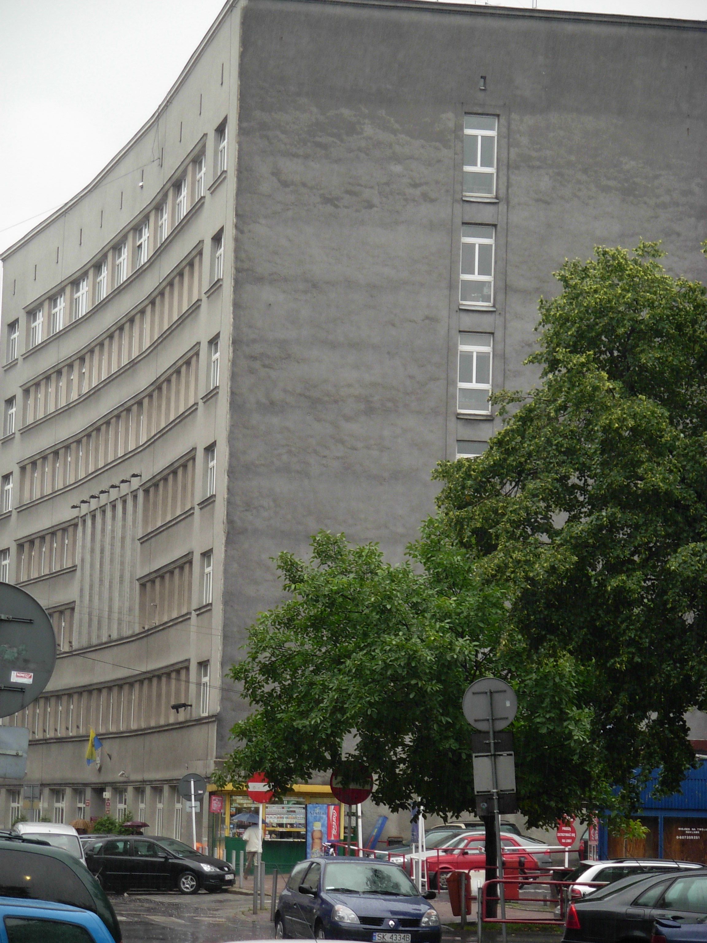 Katowice